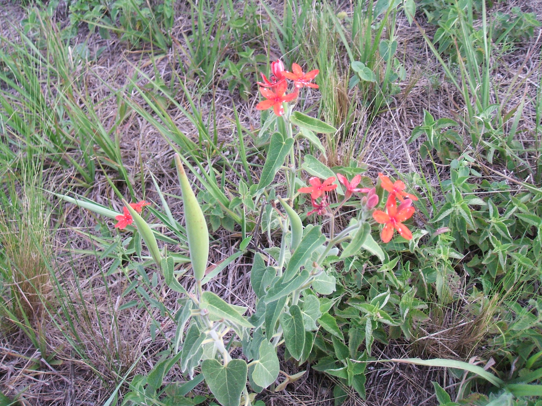 Planta completa de Amblyopetalum coccineum, donde se ven flores los frutos verdes aun, tallos y hojas.